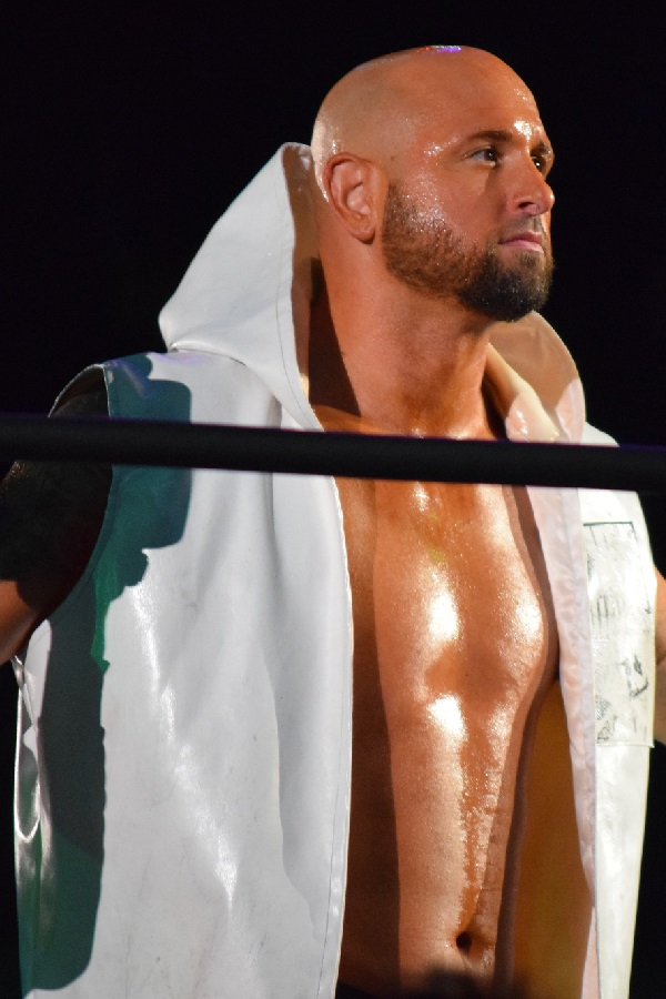 2016年2月11日 大阪府立体育会館 「THE NEW BEGINNING in OSAKA」 カール・アンダーソン